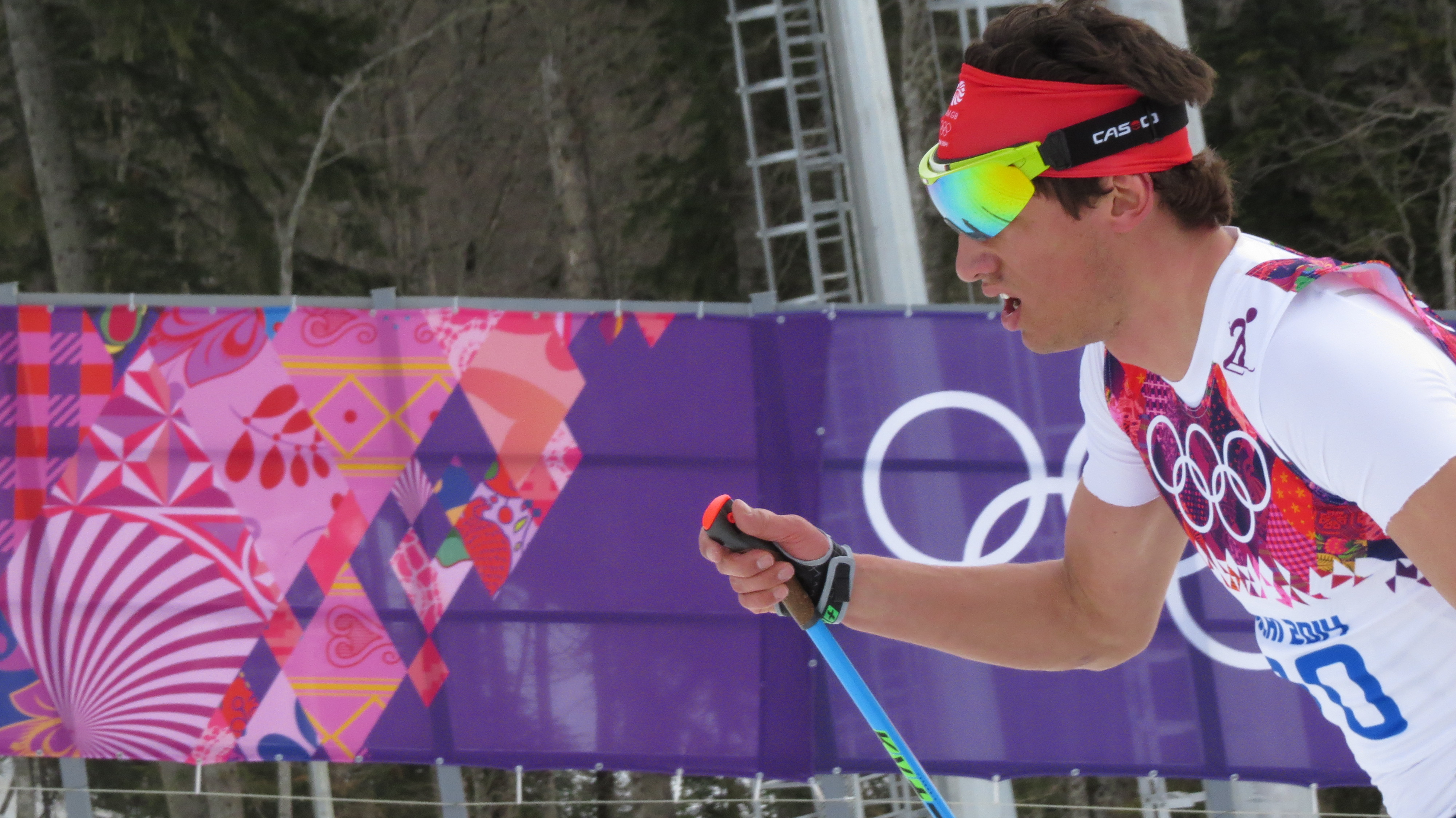 Лыжные гонки на зимних Олимпийских играх 2014 — 15 км классическим стилем (мужчины)